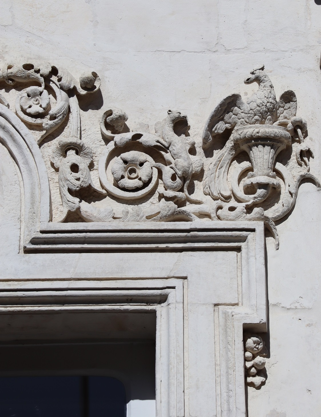 Détail sculpté de l'Hôtel Danjou de la Garenne sis commune de Fougères (35) au 32 Rue Nationale. 1er étage, travée extérieure. Détail du linteau de la fenêtre.